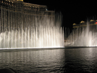 貝拉吉歐(Bellagio)飯店前的水舞表演 貝拉吉歐(Bellagio)飯店是美國內華達州的賭城拉斯維加斯境內最豪華的賭場飯店之一，其門前的巨大人工池塘在晚間會以15分鐘的間隔進行水舞表演，是賭城非常受觀光客歡迎的節目之一。 本圖片由上傳者User:SElephant拍攝於2003年2月。